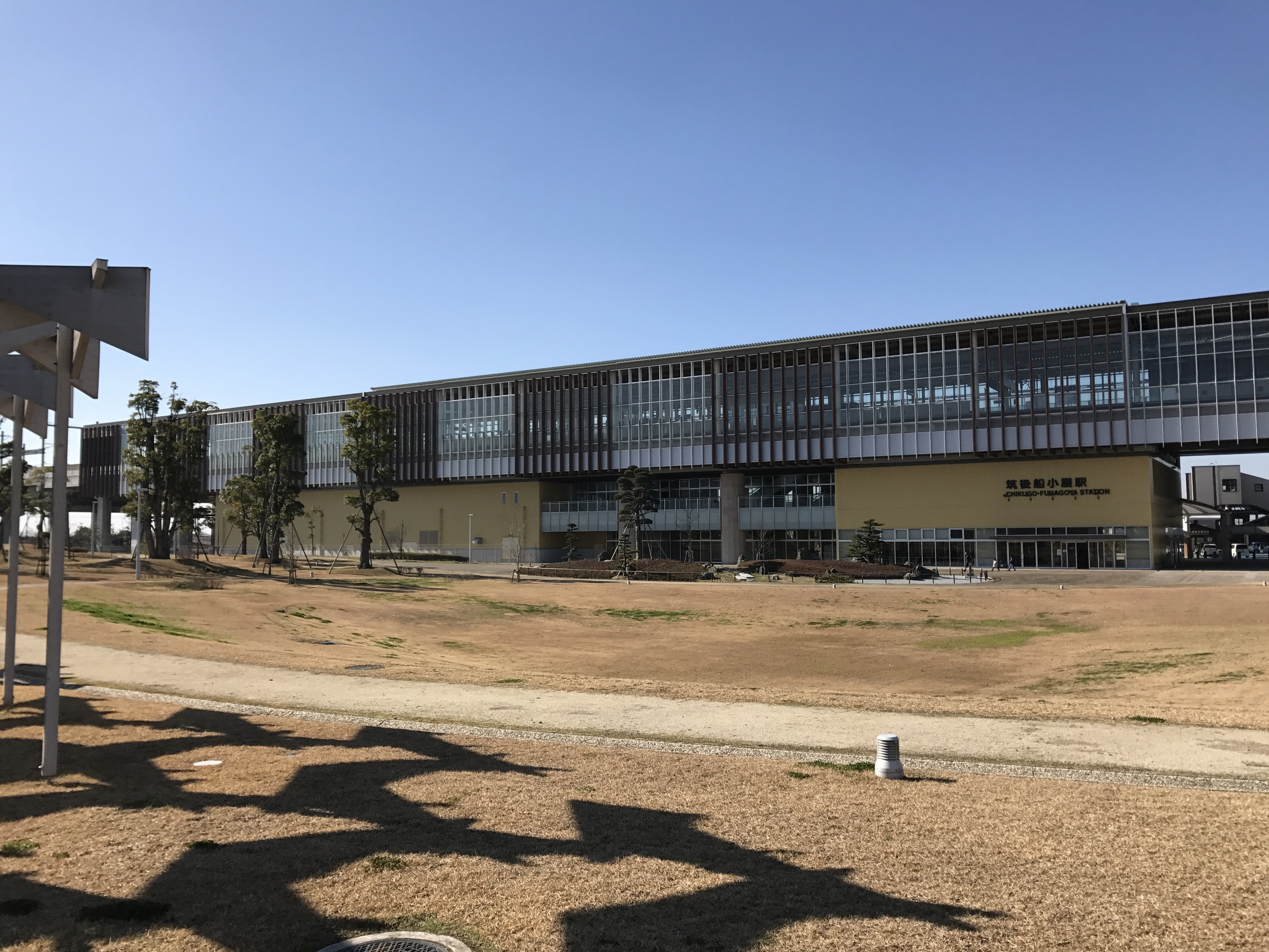 筑後広域公園より望む筑後船小屋駅駅舎